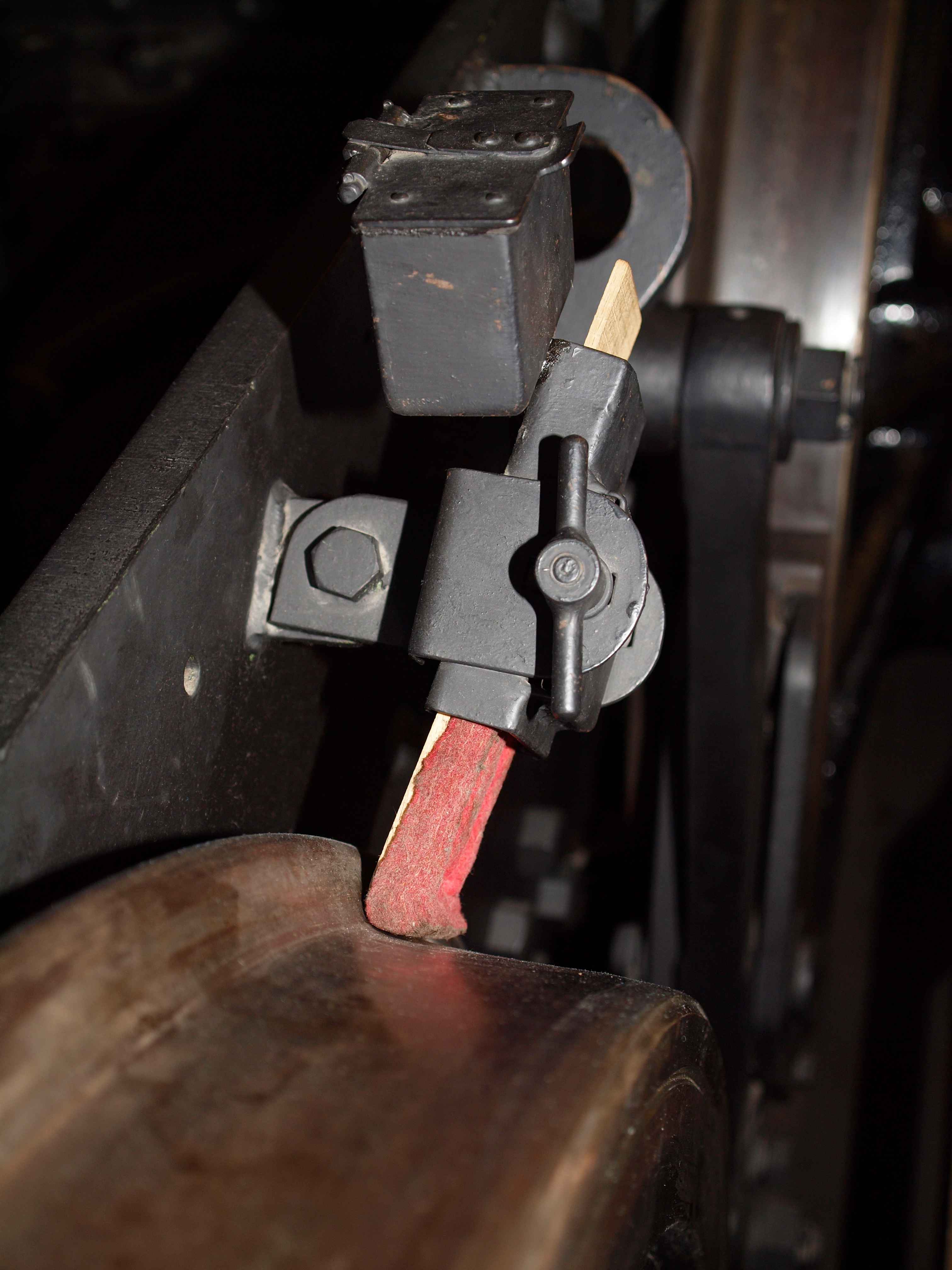 Der Spurkranzschmierapperat an der BLS Ce 6/6. Aufgenommen am erhaltenen Drehgestell im Verkehrshaus Luzern